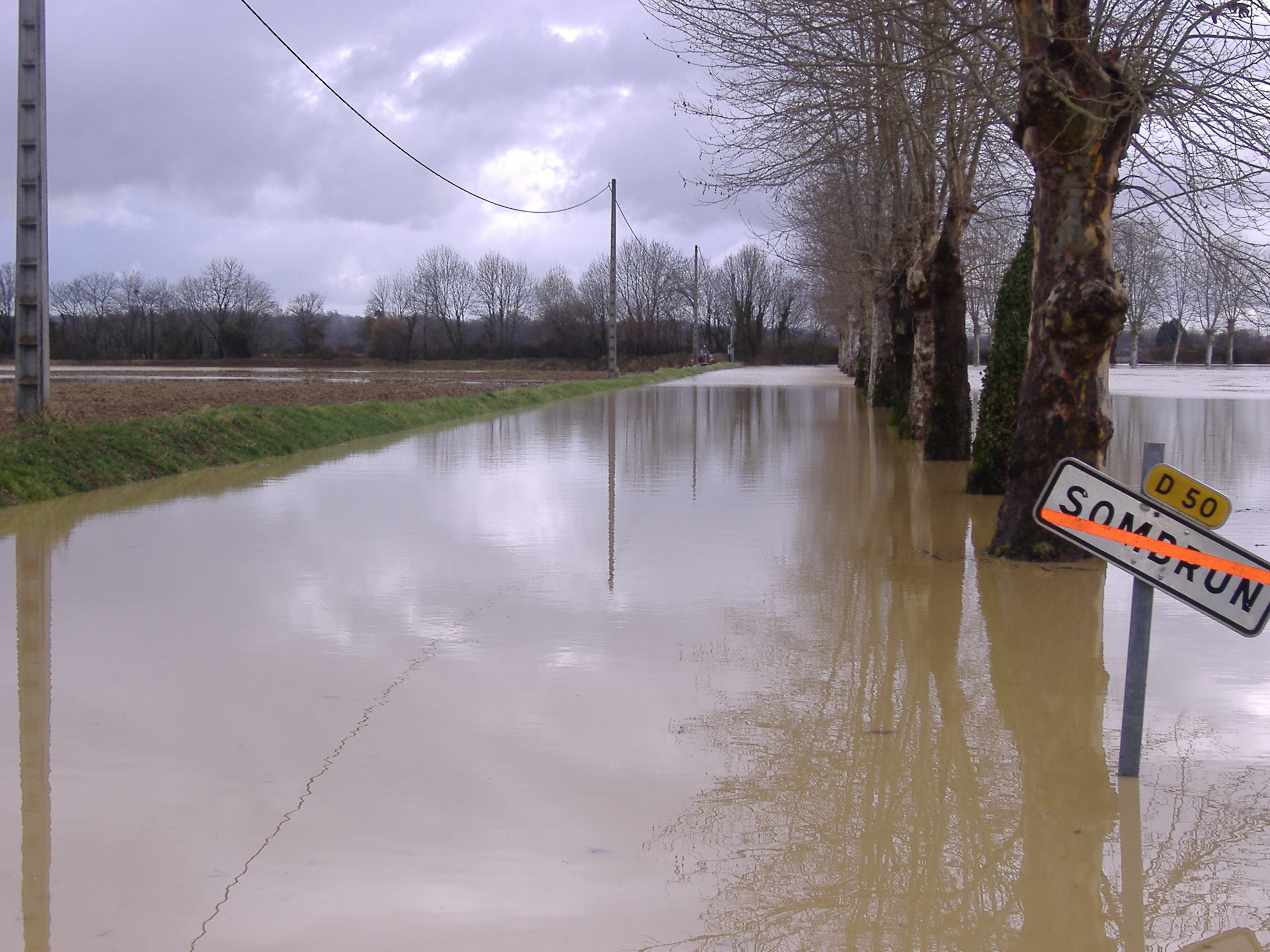 Crue du ruisseau Layza en mars 2006. Sombrun. Hautes-Pyrénées . France.